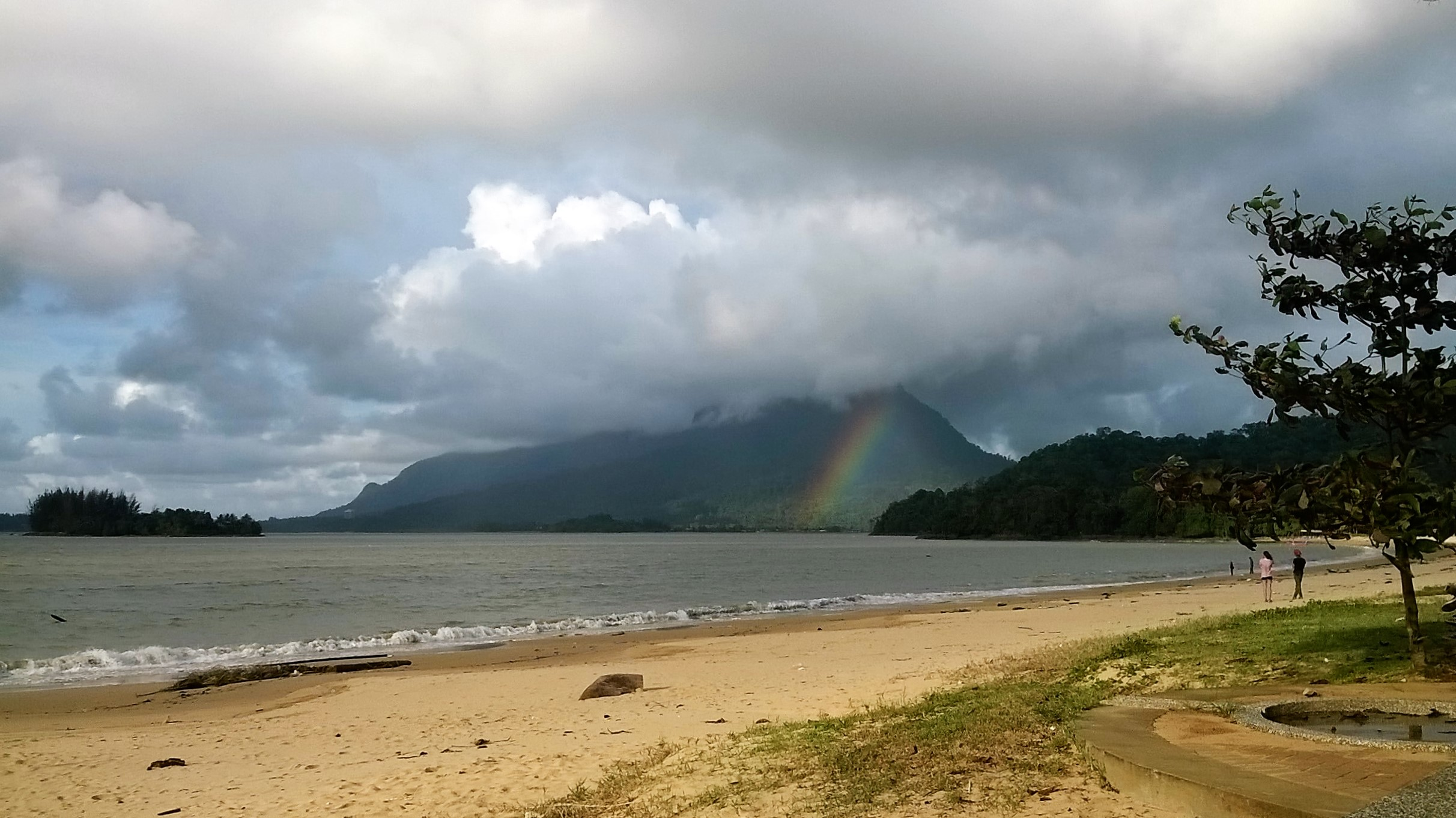 Gunung Santubong, Pandangan dari Pantai Pasir Pandak.